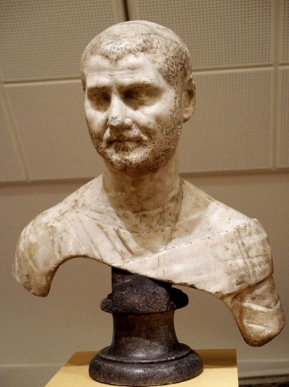 Погруддя Требоніана Галла, ІІІ ст., мармур. Лувр, Париж